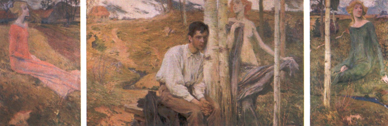 Jaro.